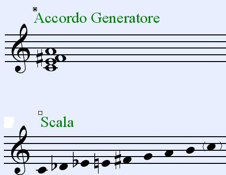 Sistema Ottotonico